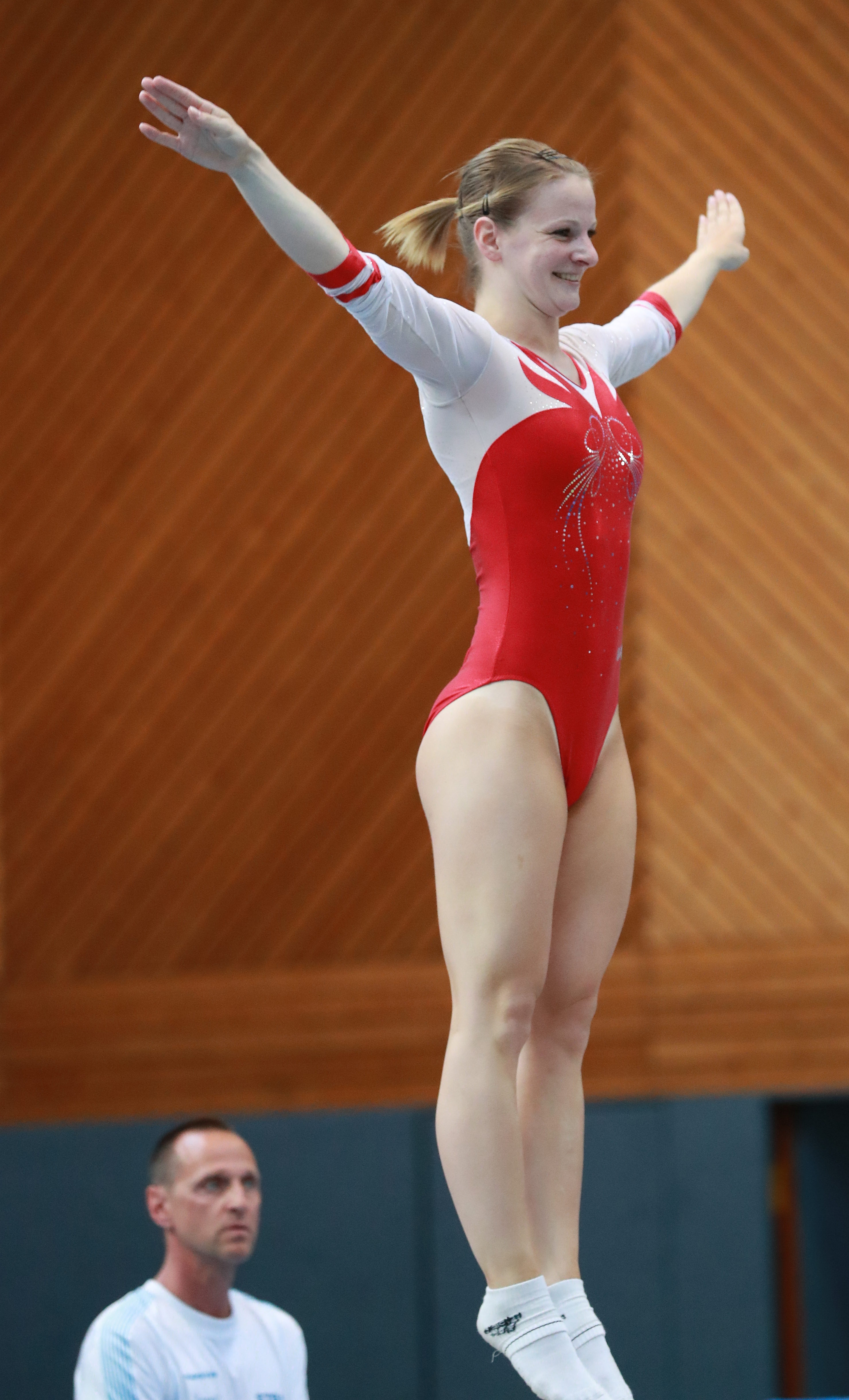 Wettkampf 9 Elite weiblich Erwachsene 2001 und älter Finale beim 9. Internationalen Filder Pokal im Trampolinturnen 2018 in Ruit. Abgebildet: Leonie Adam.